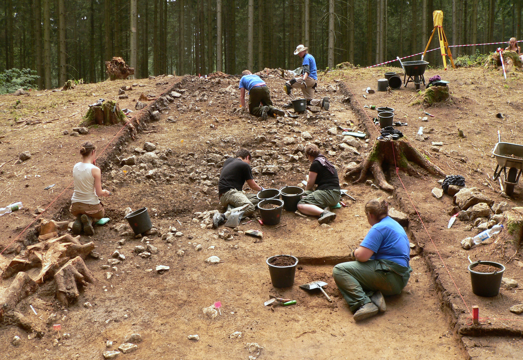 Grabungsschnitt am Harzhorn